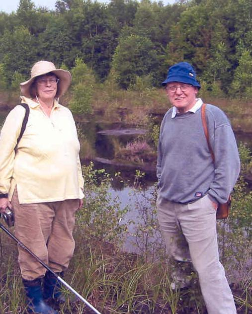 Hinrich Rahmann, geb. 28.11.1935, 1973-2001 Professor für Zoologie, Universität Hohenheim (Stuttgart), und seine Frau Mathilde Rahmann, promovierte Zoologin, in Wiesmoor.